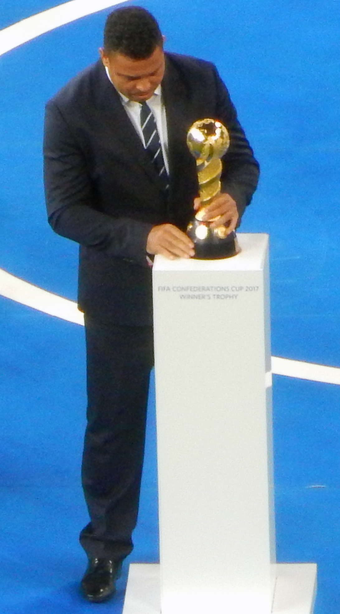 Финал Кубка конфедераций 2017